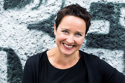 Portrait von Rahel Jaeggi